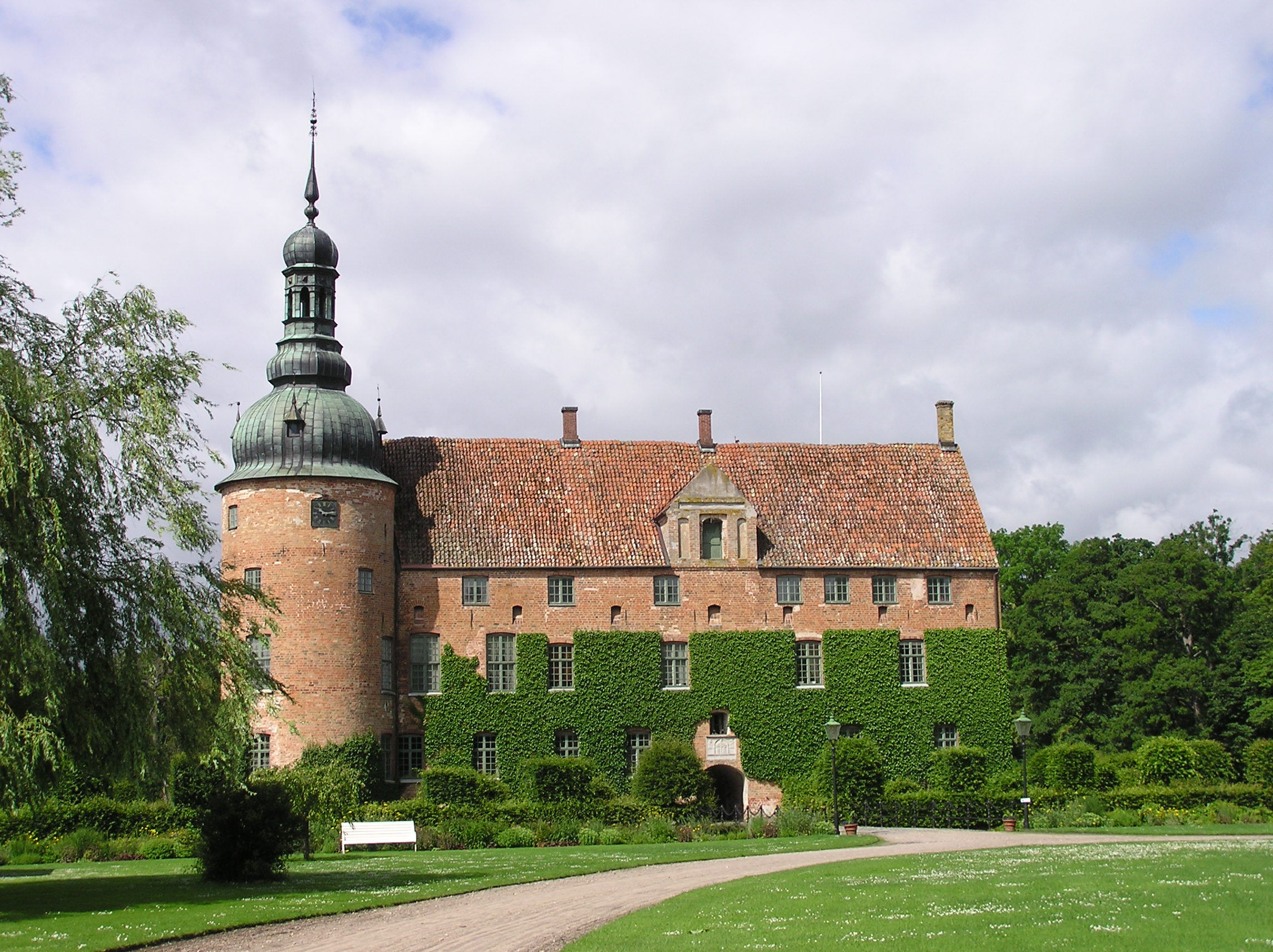 Vittskövle Slot